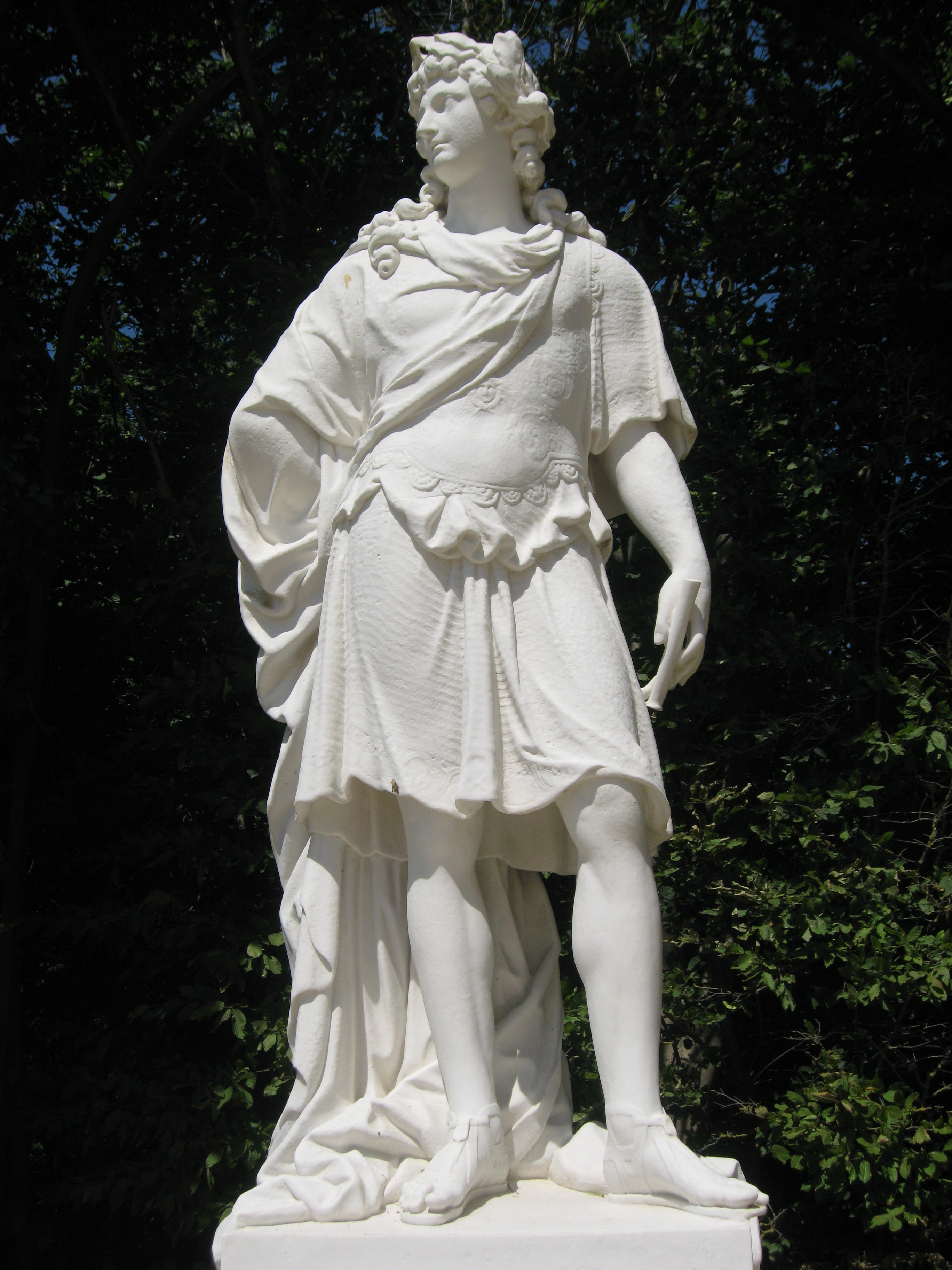 Le poème héroïque par Drouilly